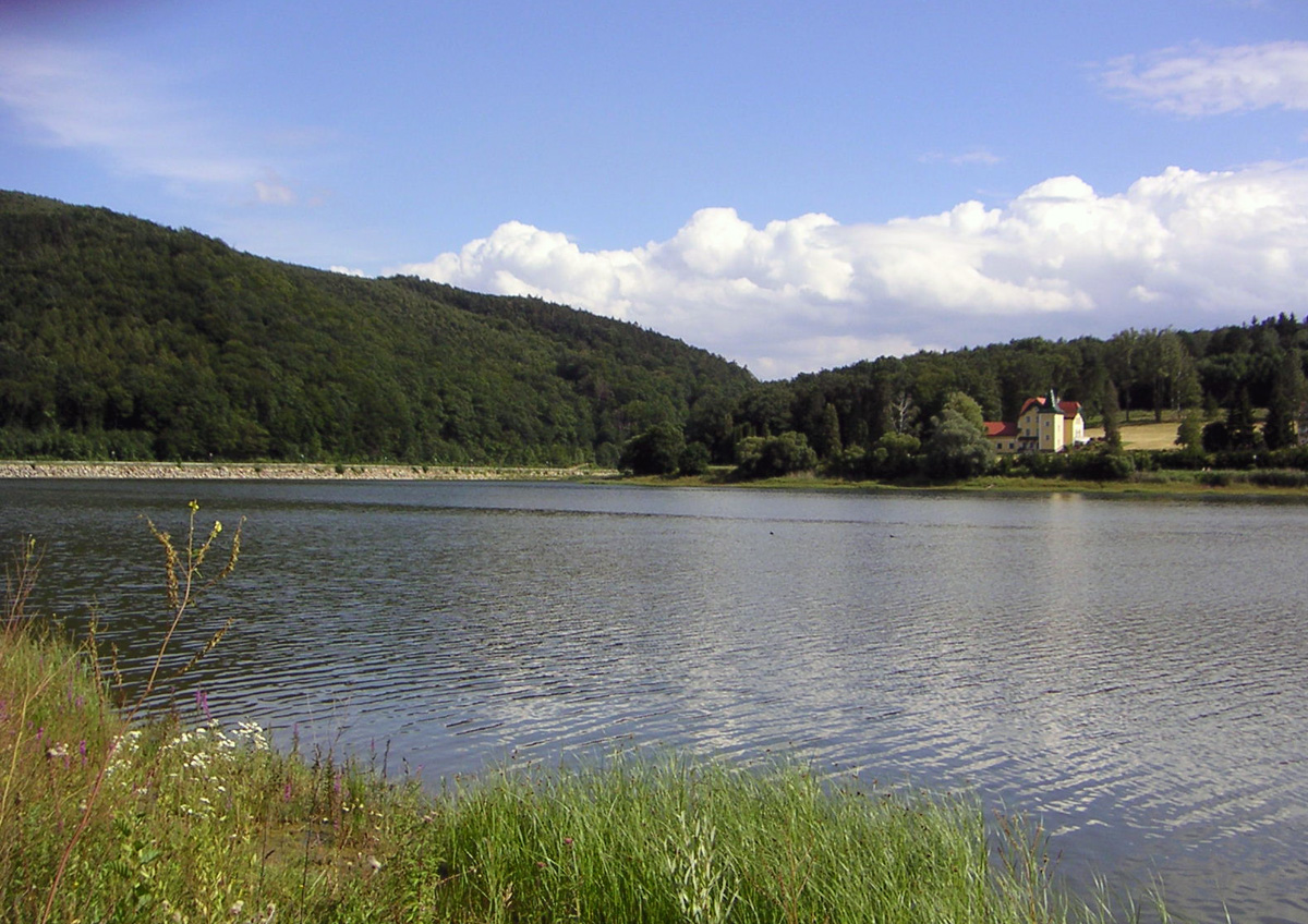 Wienerwaldsee, fotografiert von Peter Binter am 24. Juli 2005